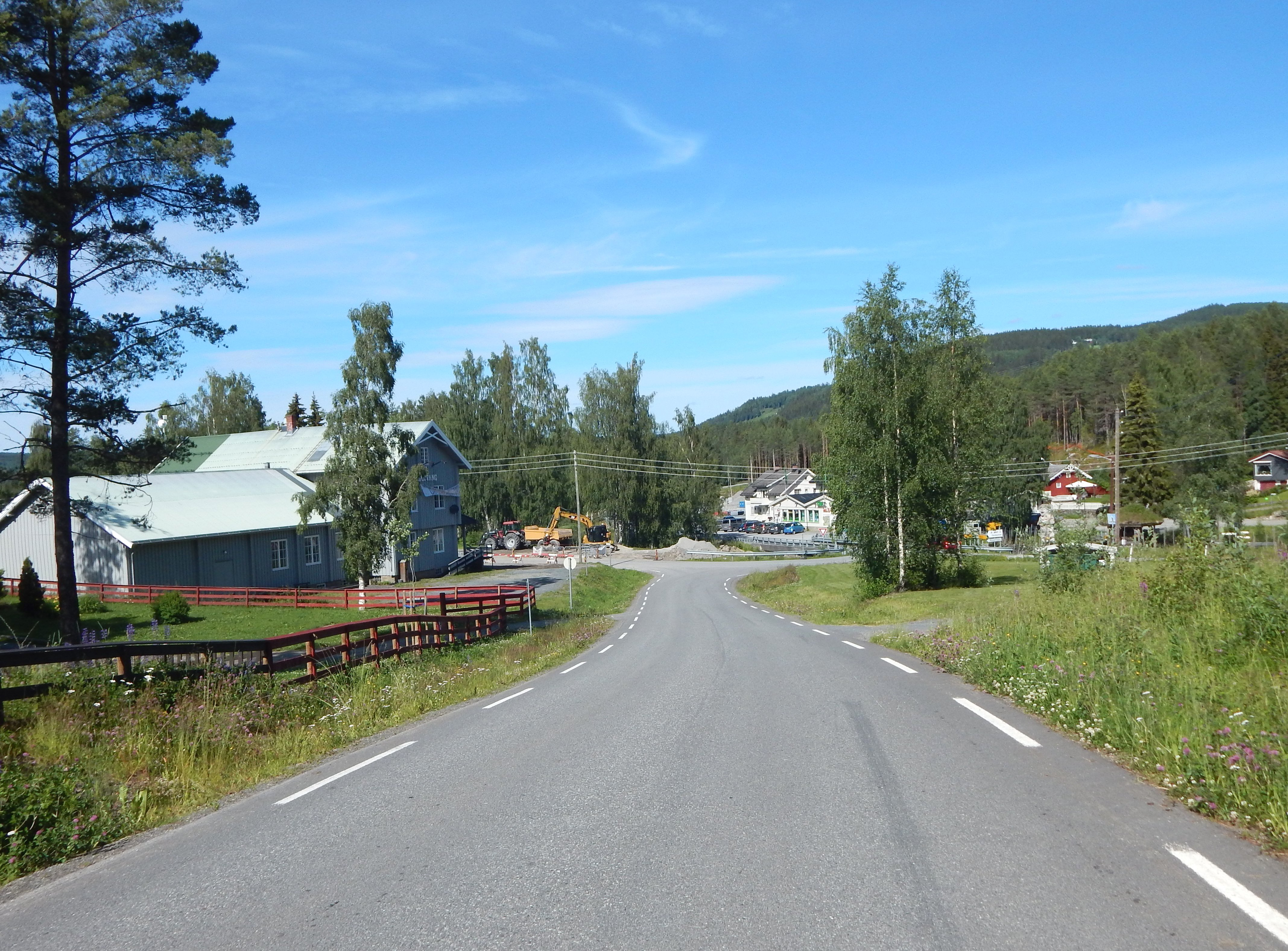 Fløtlivegen (fylkesvei 1676, tidl. FV17 i Hedmark)